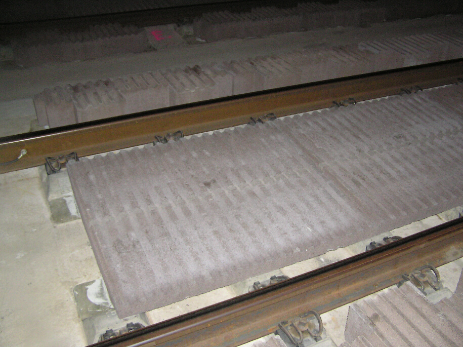 Schallabsorber im Euerwangtunnel, ICE-Neubaustrecke Nürnberg-Ingolstadt